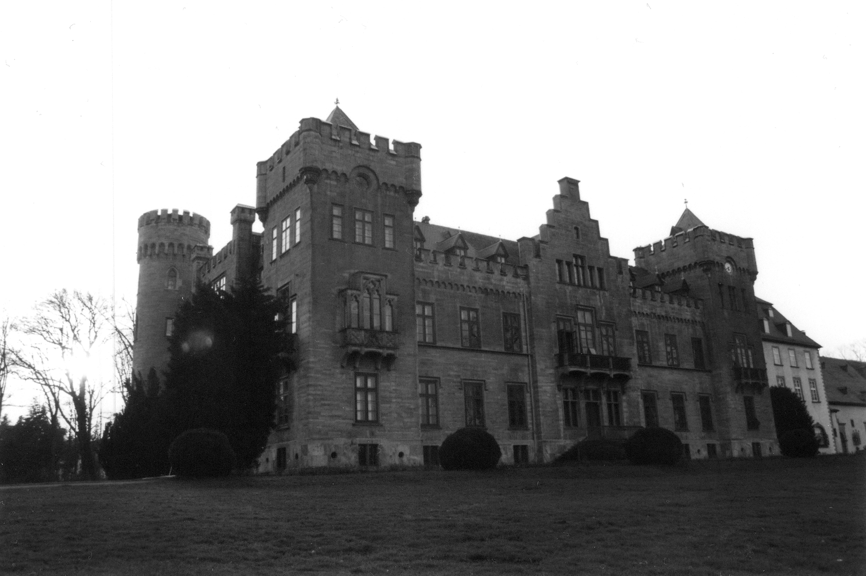 Schloss Herdringen vom Schlosspark aus gesehen